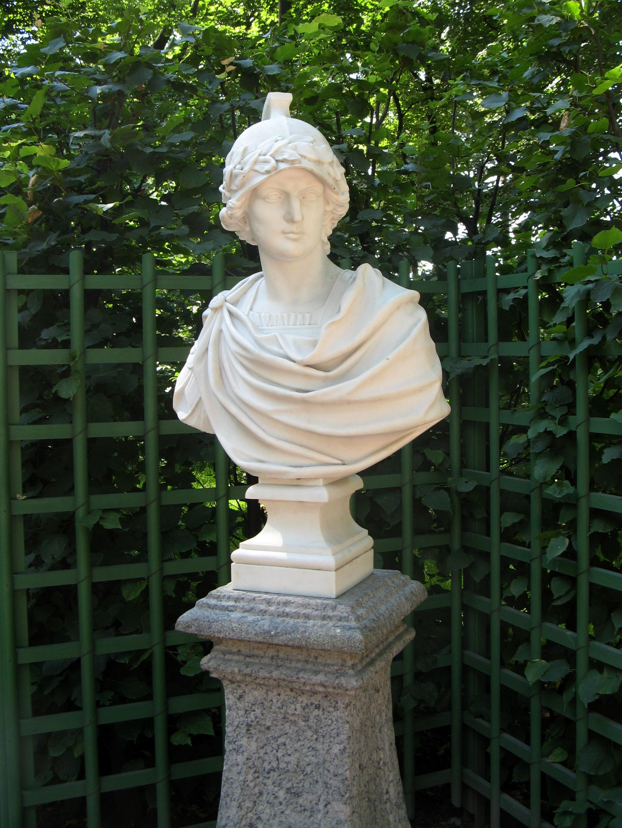 Бюст Александра Македонского (Санкт-Петербург, Летний сад, Главная аллея, первая площадка)